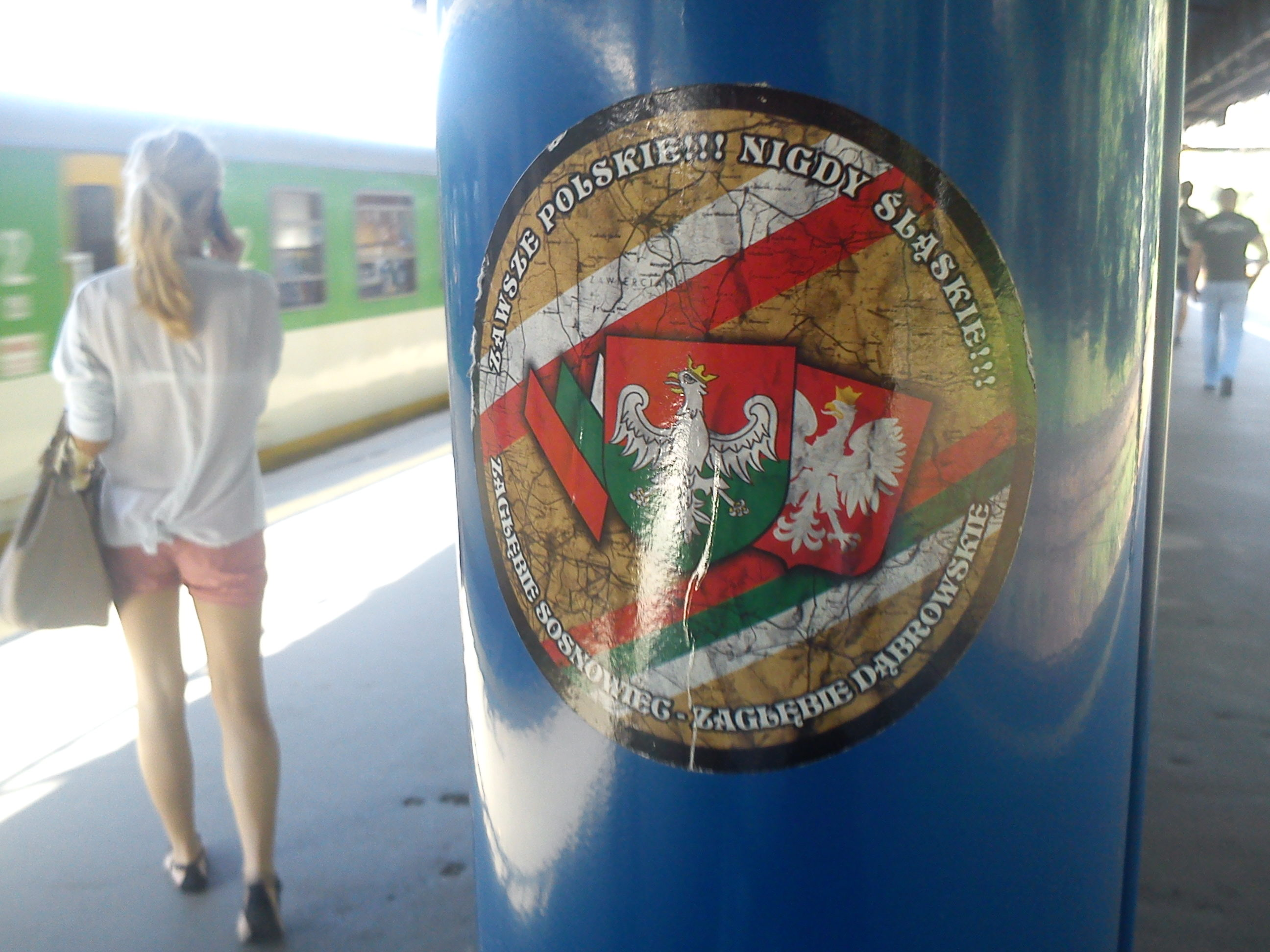 Wlepka na przystanku W-wa Ochota.